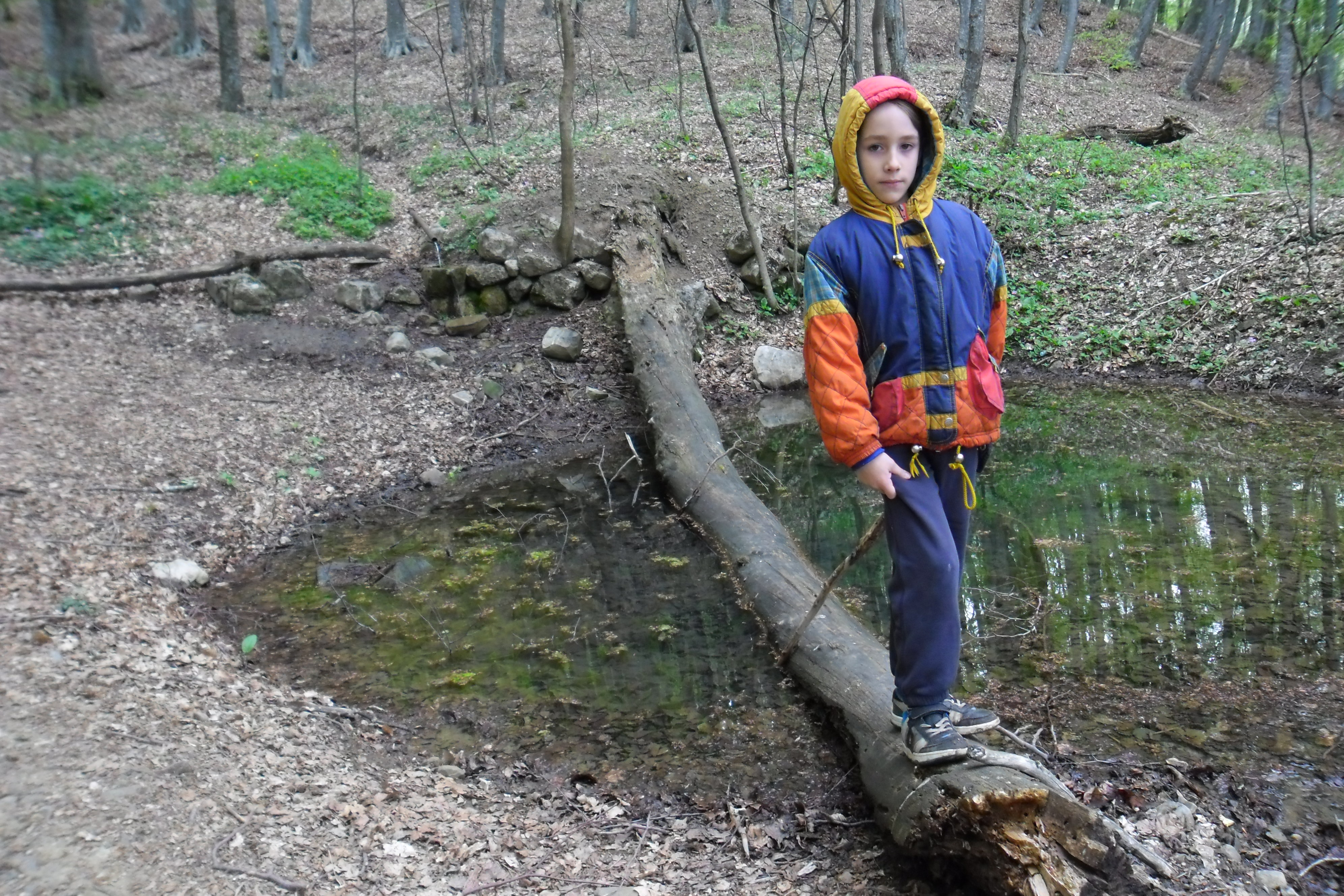 На кладці